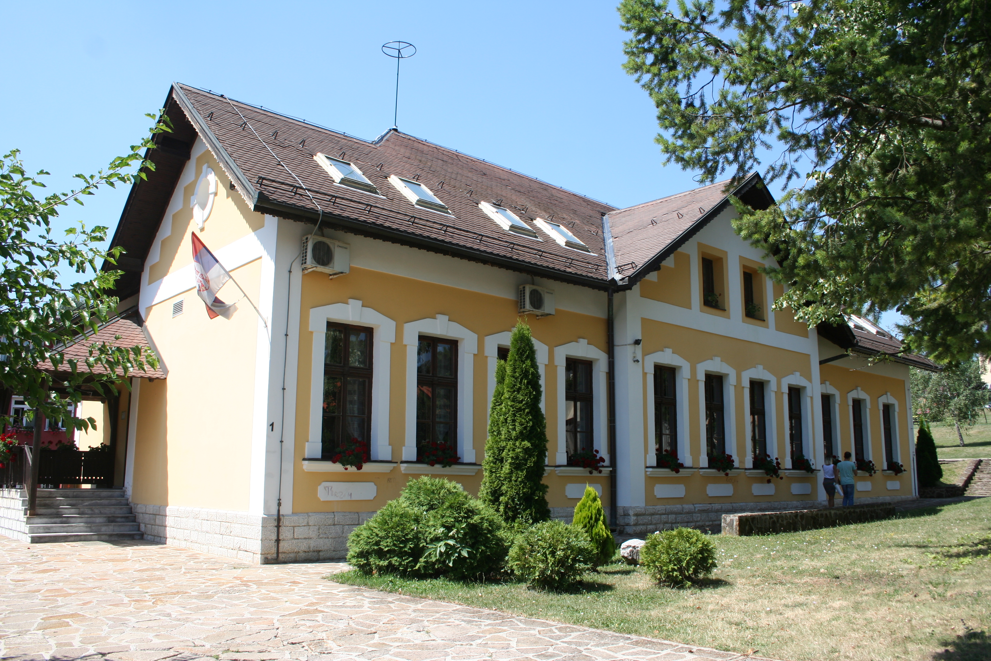 Biblioteka "Ljubiša R. Đenić" Čajetina